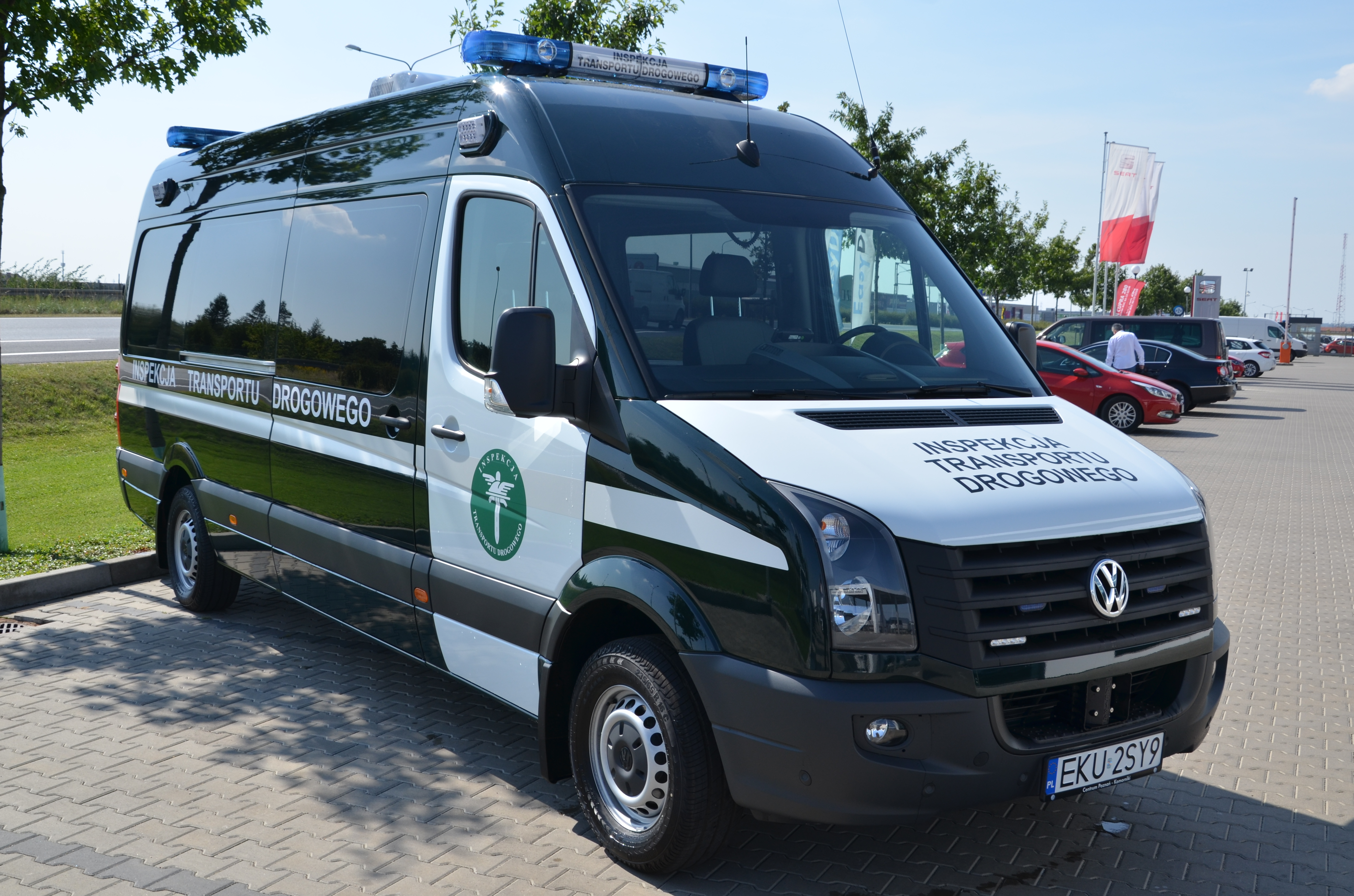 Pojazd Inspekcji Transportu Drogowego na bazie Volkswagena Craftera przygotowany przez AMZ Kutno